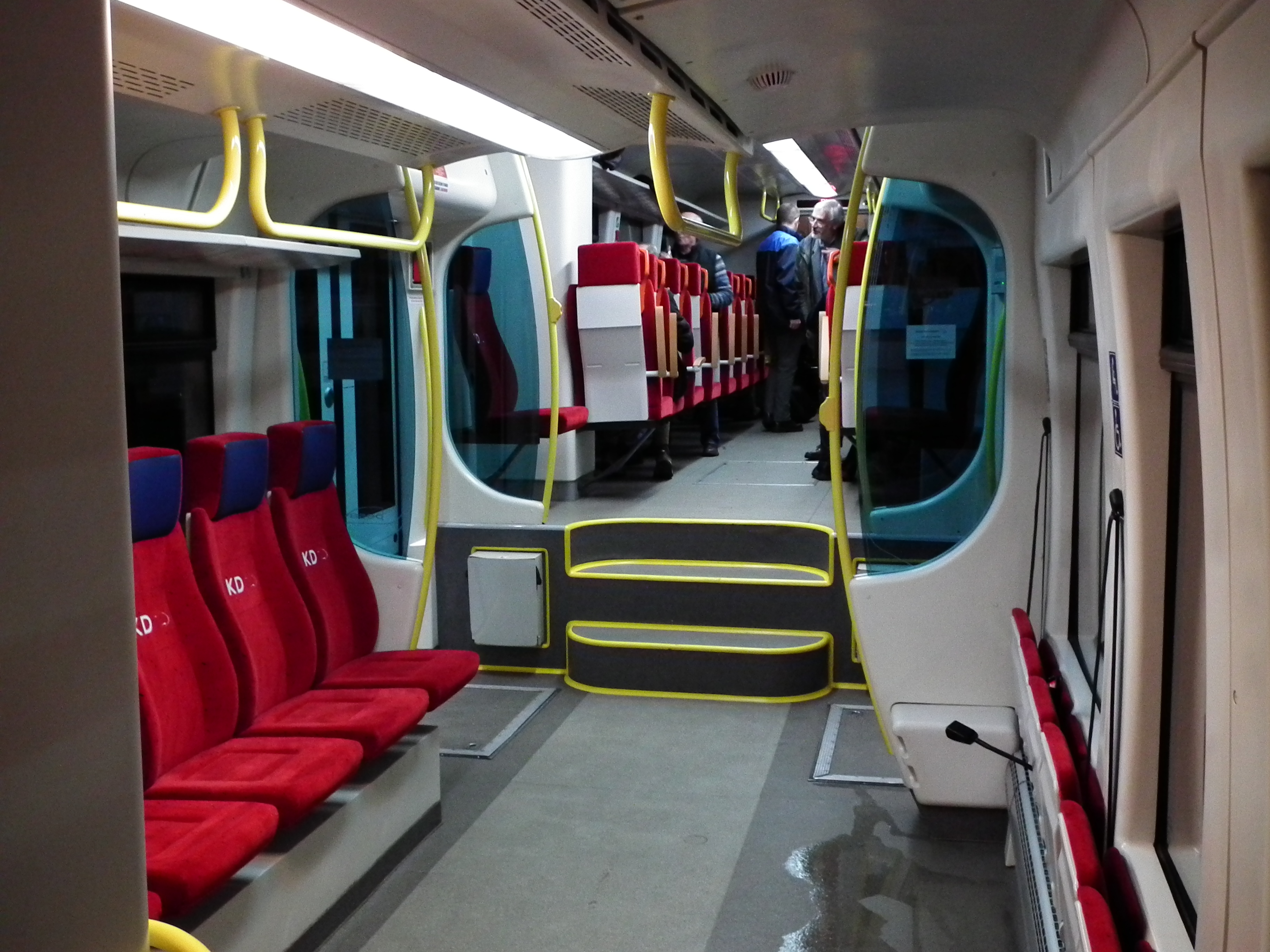 Impreza kolejowa Dolnośląskie Zakamaeki II w dniu 17 października 2015r. na liniach kolejowych Dolnego Śląska. Skład pociągu złożony z SA134-003 i SA134--007.